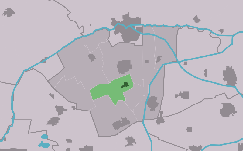 Kaartsje fan himrik fan Broeksterwâld